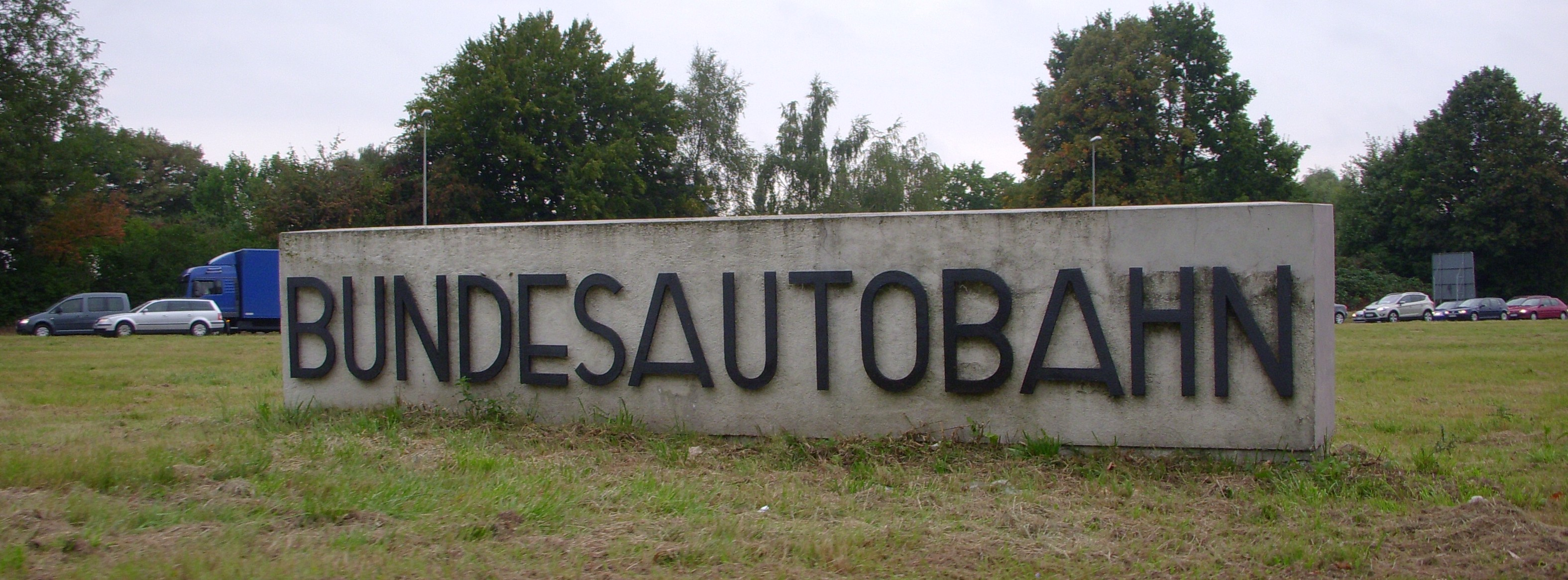 Schild "BUNDESAUTOBAHN" in Hamburg-Horn am Anfang der ehemaligen A1 nach Lübeck. Heute beginnt hier die A24 nach Berlin. Früher lautete der Text "REICHSAUTOBAHN".